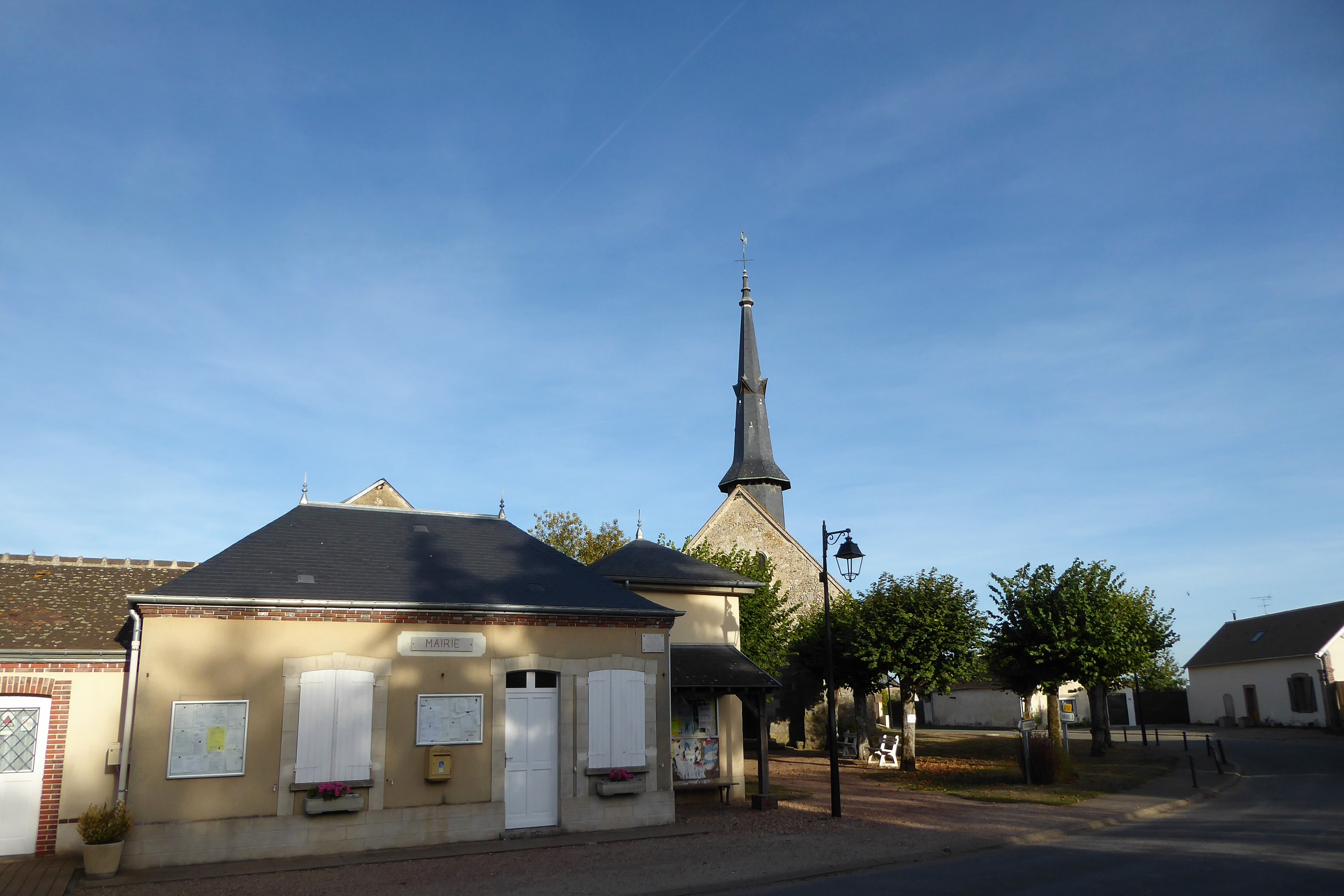 mairie et église de la Chapelle-Forainvilliers, Eure-et-Loir, France.